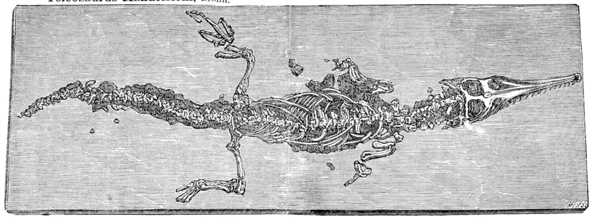 Teleosaurus mandelsohi Skeleton